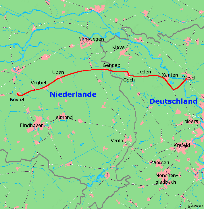 Van :de:Bild:Boxteler Bahn.png, maar betere kompressie (16-kleurenpalet); teksten zijn nog wel Duits. Karte der Boxteler Bahn, Kartenquelle: [1]